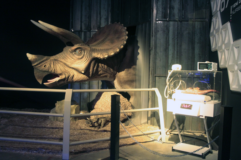 Yeni Doğan Görsel